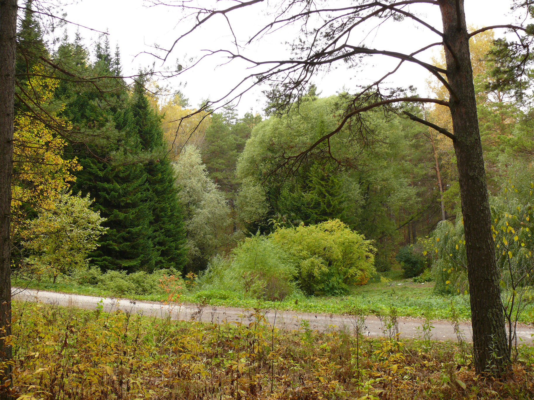 Центральный сибирский ботанический сад - осень